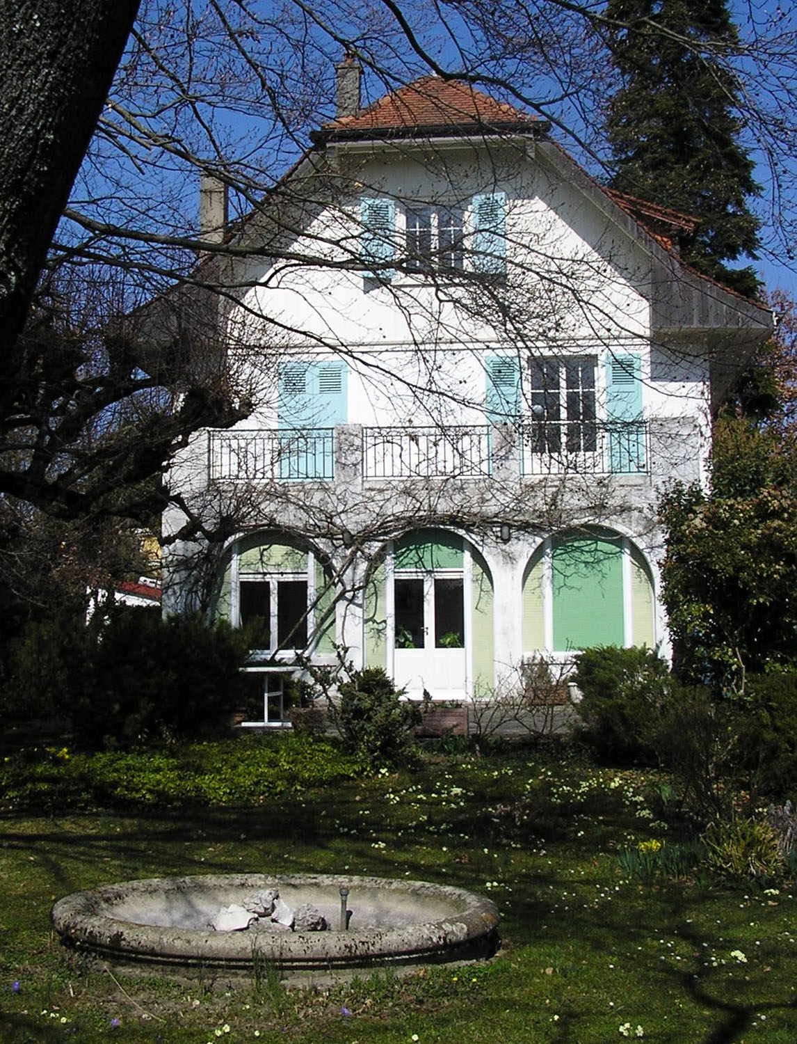 La maison quaker de Genève, abritant les bureaux du Quaker United Nations Office (le «Bureau quaker auprès des Nations unies»)